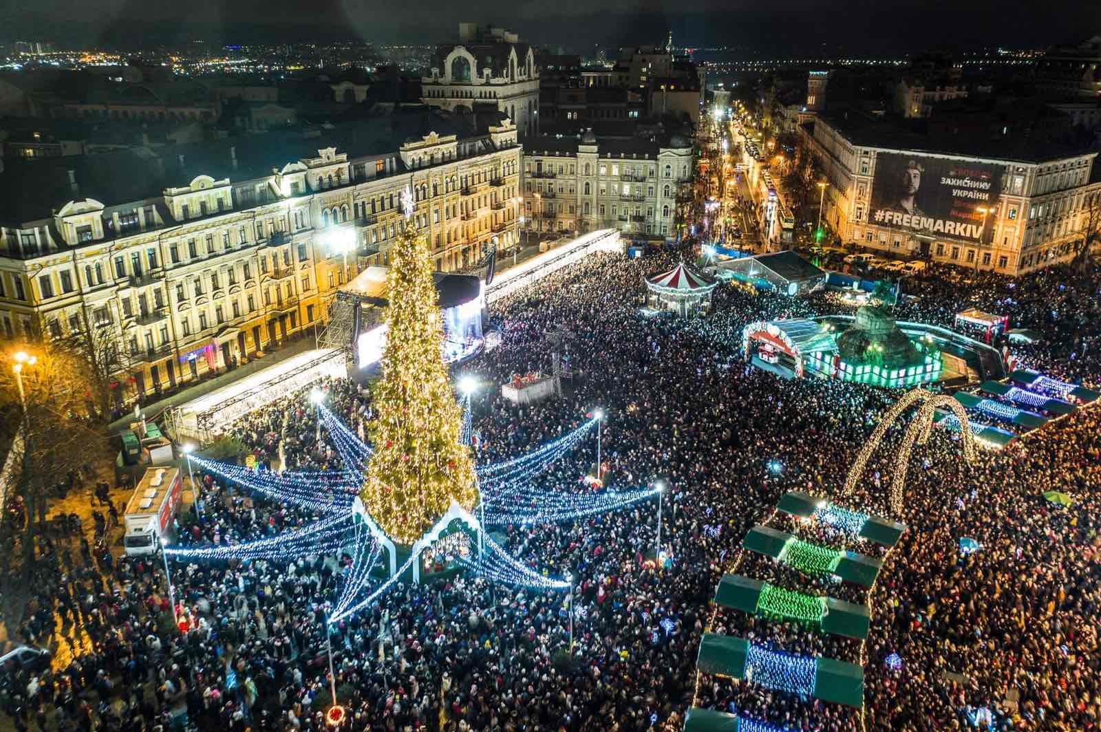 Новорічна ялинка в Києві, 2019-2020